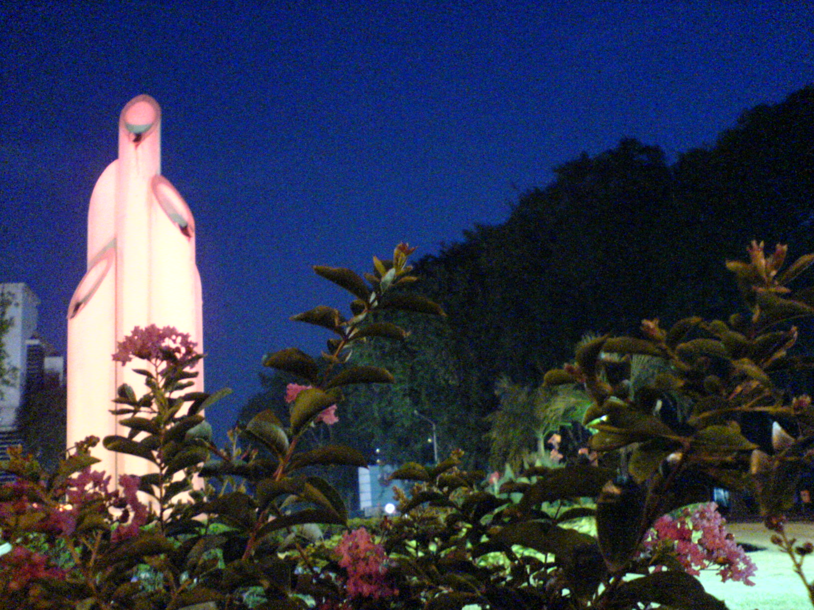 dawn @ bambu runcing monumen, jl jendral sudirman